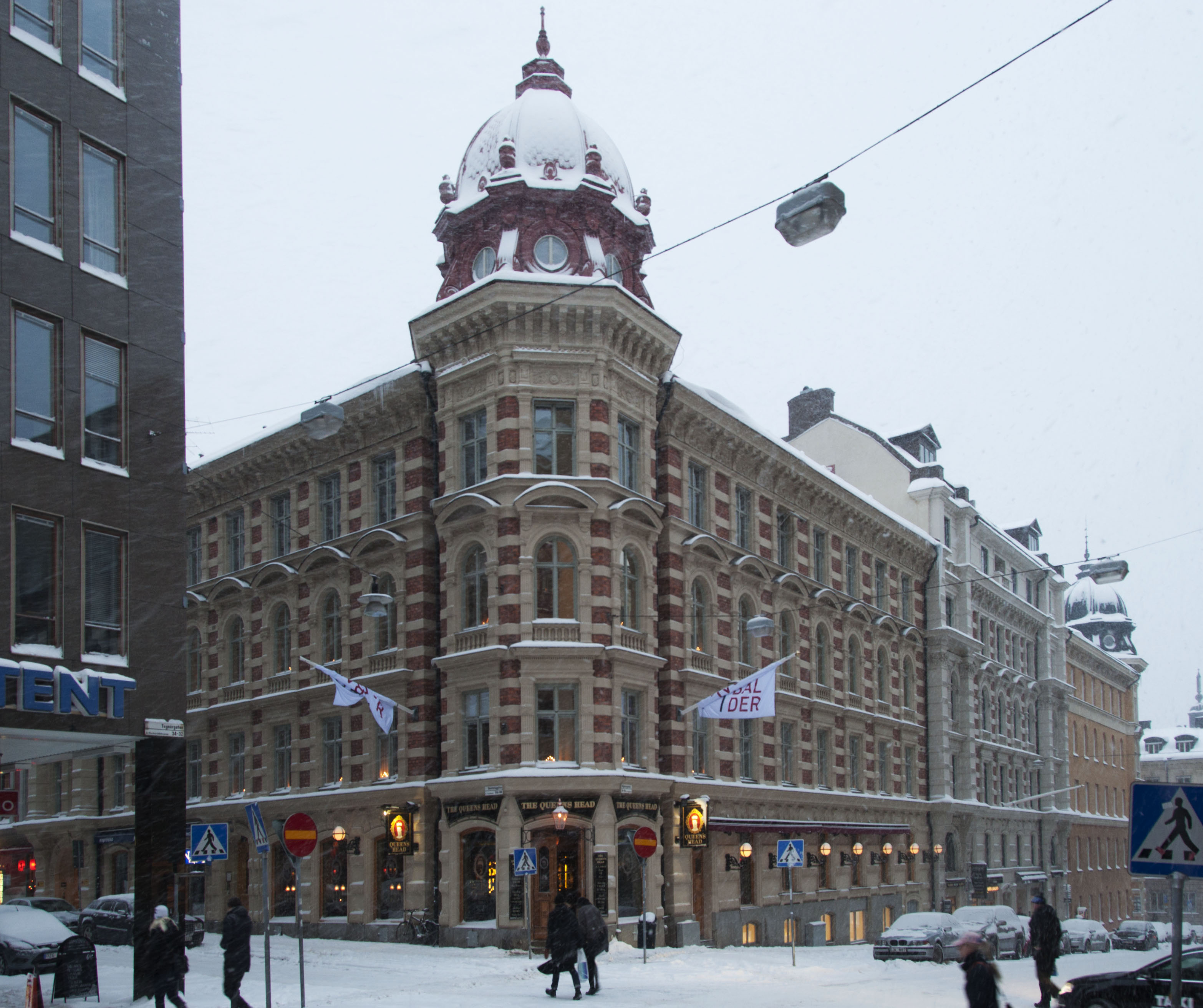 Tegnérgatan 26-30. Byggnadsår 1882-85. Arkitekt Oskar Erikson